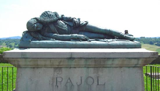 Général Pajol étendu sur le sol